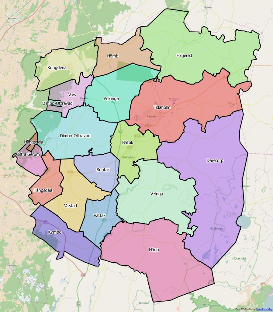 Distriktsindelningen i Tidaholms kommun World file: 59.6439474090908277 0 0 -59.6439474090908277 1524200.85076070250943303 8028035.97904382366687059